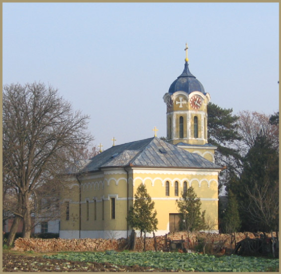 Eastern Orthodox Church of Glogonj, near Pančevo, Vojvodina (Serbia)/L'église orthodoxe de Glogonj, près de Pančevo, Voïvodine (Serbie)